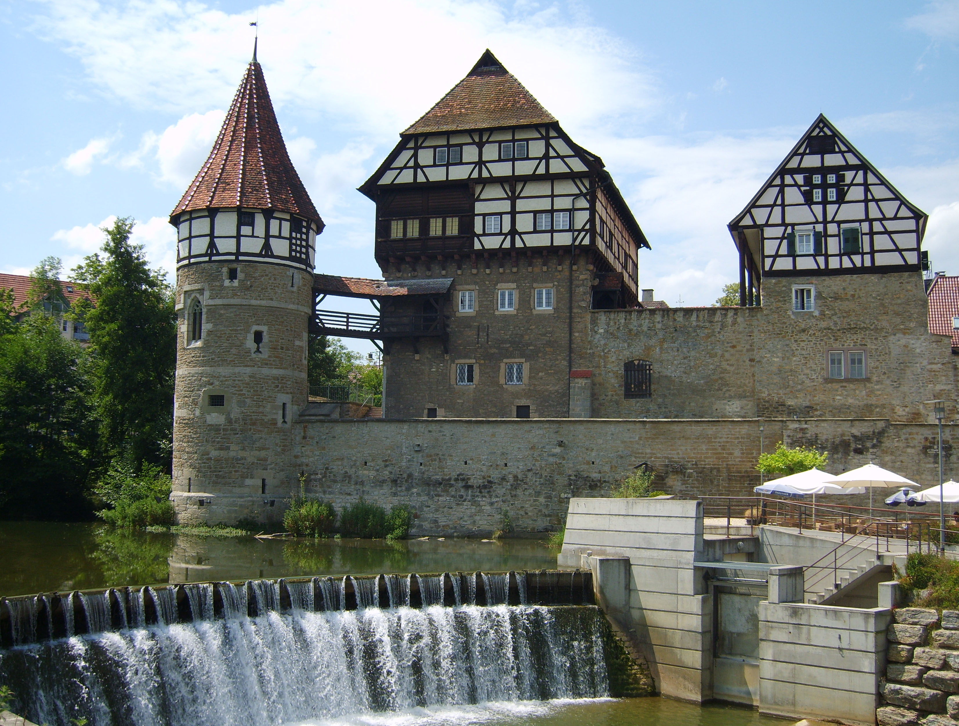 Zollernschloss Balingen Wasserturm - Schloss - Reiterhaus mit Eyachwehr